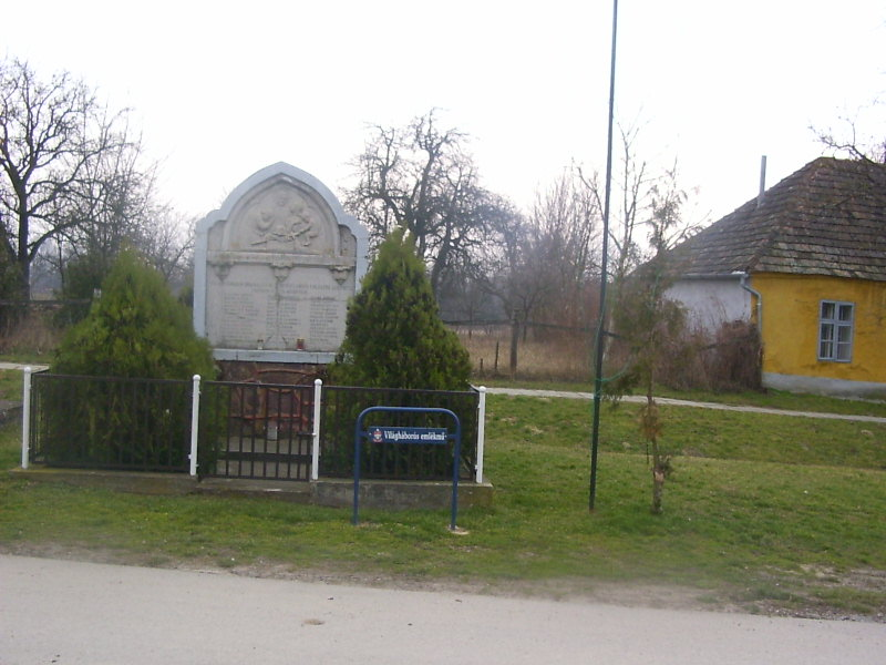 Nagydémi világháborús emlékmű